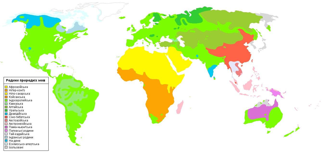 Карта поширення природніх мов